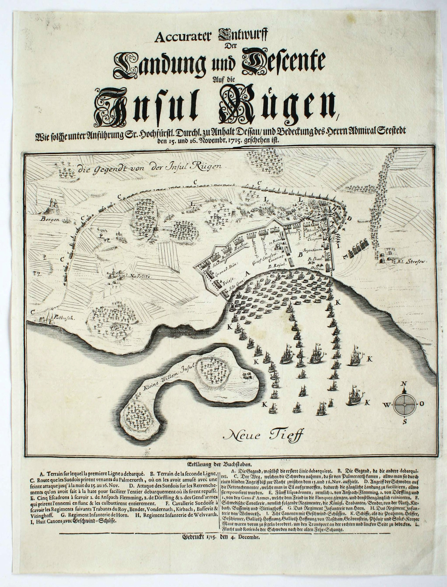 Accurater Entwurff Der Landung und Descente Auf die Jnsul Rügen, Wie solche unter Anführung Sr. Hochfürstl. Durchl. zu Anhalt Dessau, und Bedeckung des Herrn Admiral Seestedt den 15. und 16. Novembr. 1715. geschehen ist. Seltene Schilderung der Einnahme Rügens durch die Dänen und ihre Alliierten im Großen Nordischen Krieg, mit französischem und deutschem Text. Die Karte veranschaulicht die Kämpfe im nördlichen Teil des Rügener Boddens zwischen Putbus und Klein Stresow mit der vorgelagerten Insel Vilm.